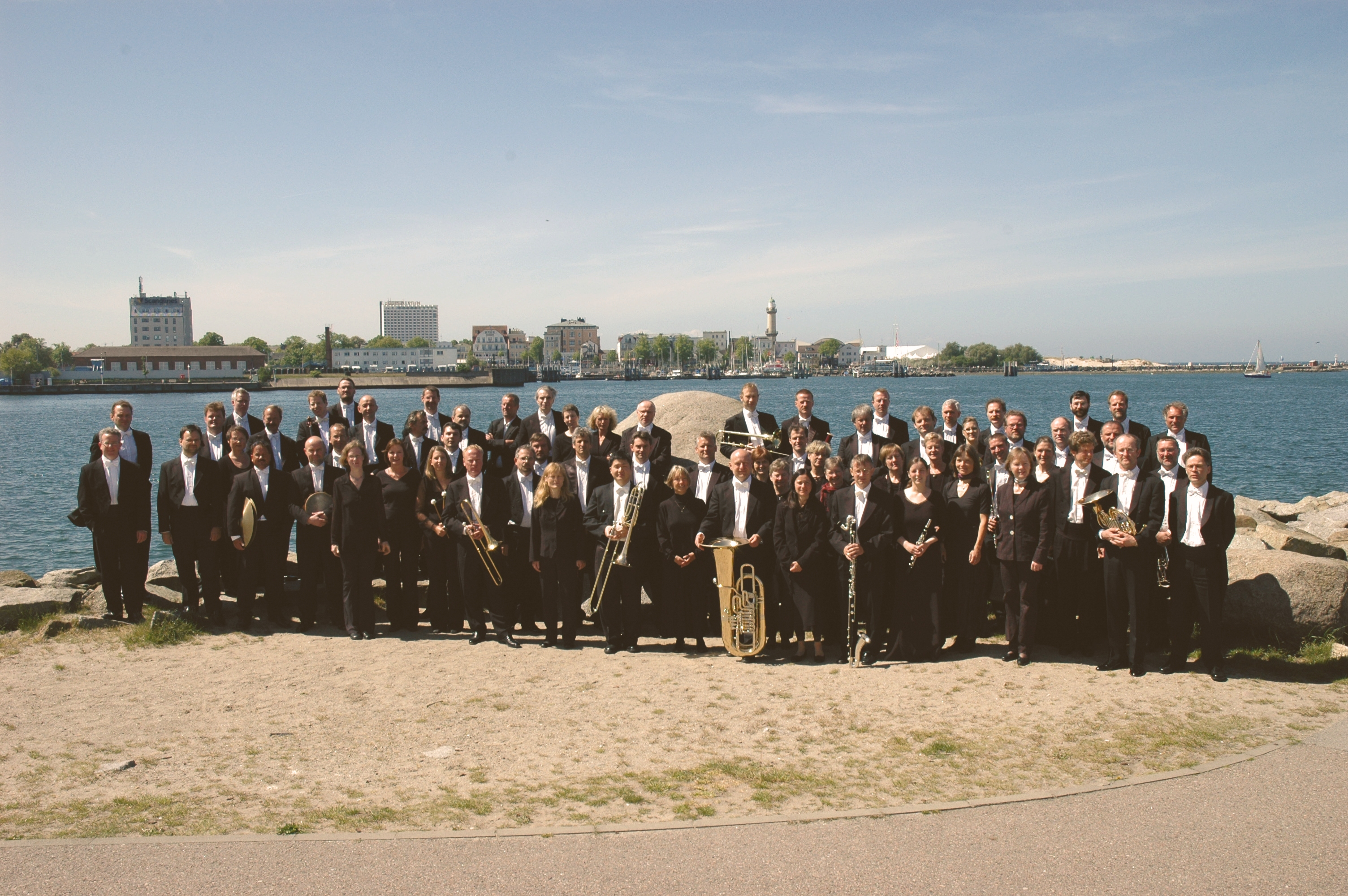 Orchesterfoto der Norddeutschen Philharmonie Rostock, Städtisches Orchester der Hansestadt Rostock und größtes Orchester des Landes Mecklenburg-Vorpommern, aufgenommen in Hohe Düne, im Hintergrund Warnemünde.